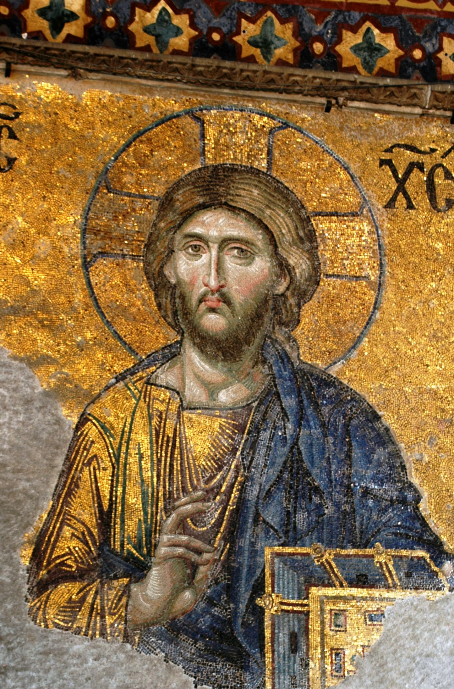 Santa Sofia - Crist Pantocrator